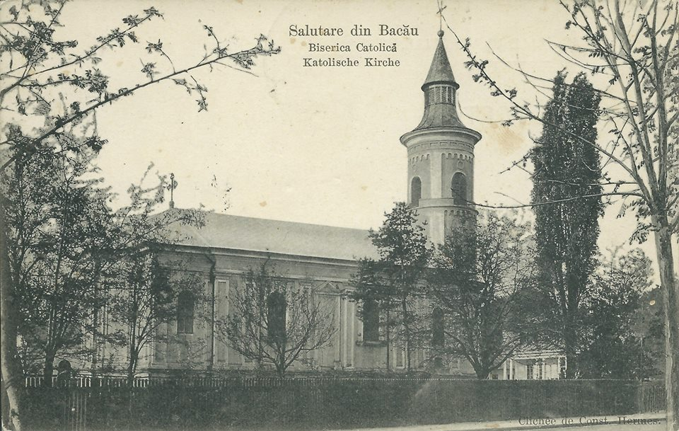 Biserica romano-catolică Sfântul Nicolae din Bacău, consacrată la 6 decembrie 1846.